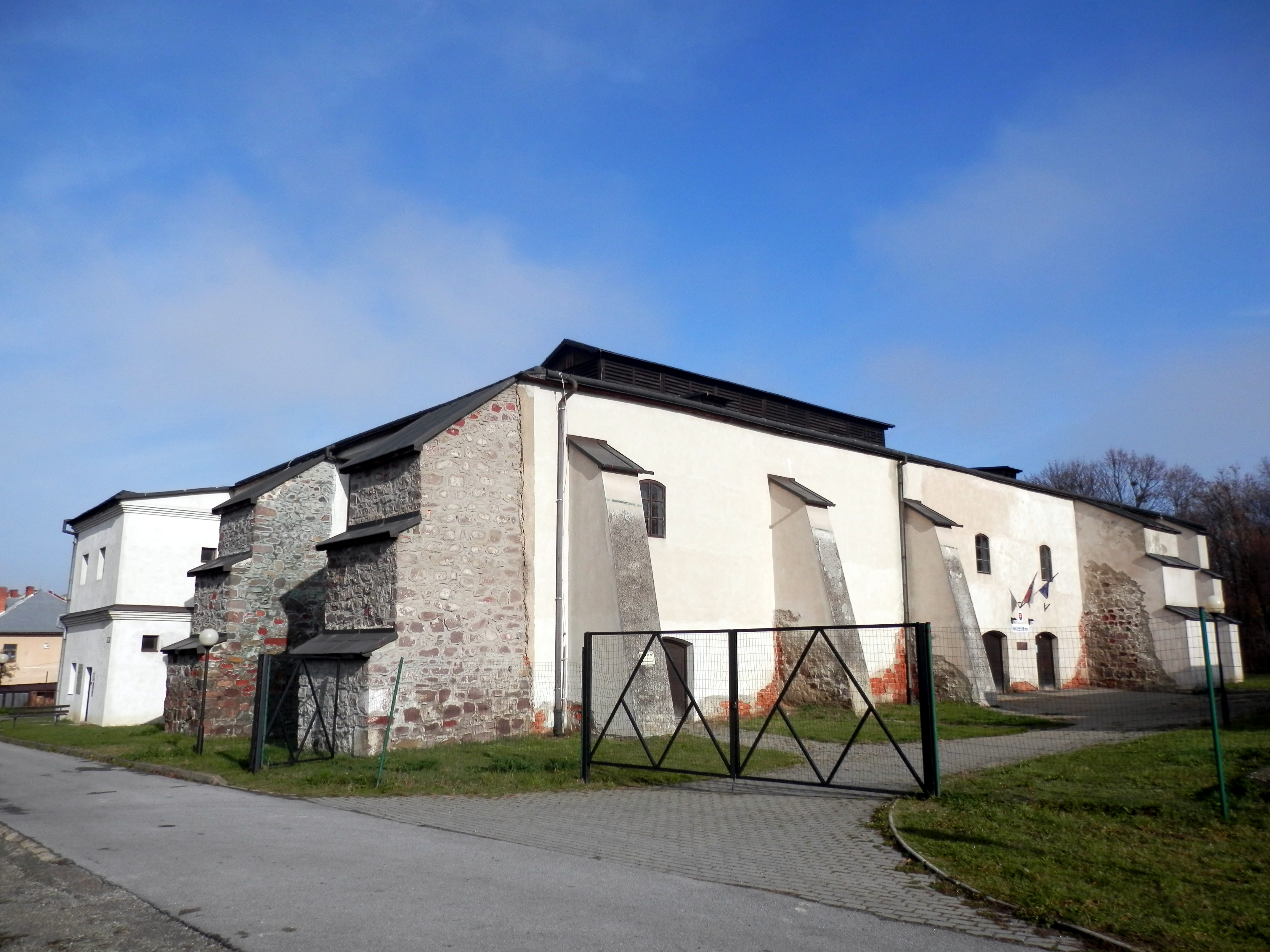 Solivar ulica Zborovská 2. Mesto Prešov. Národná kultúrna pamiatka - varňa, výrobňa soli